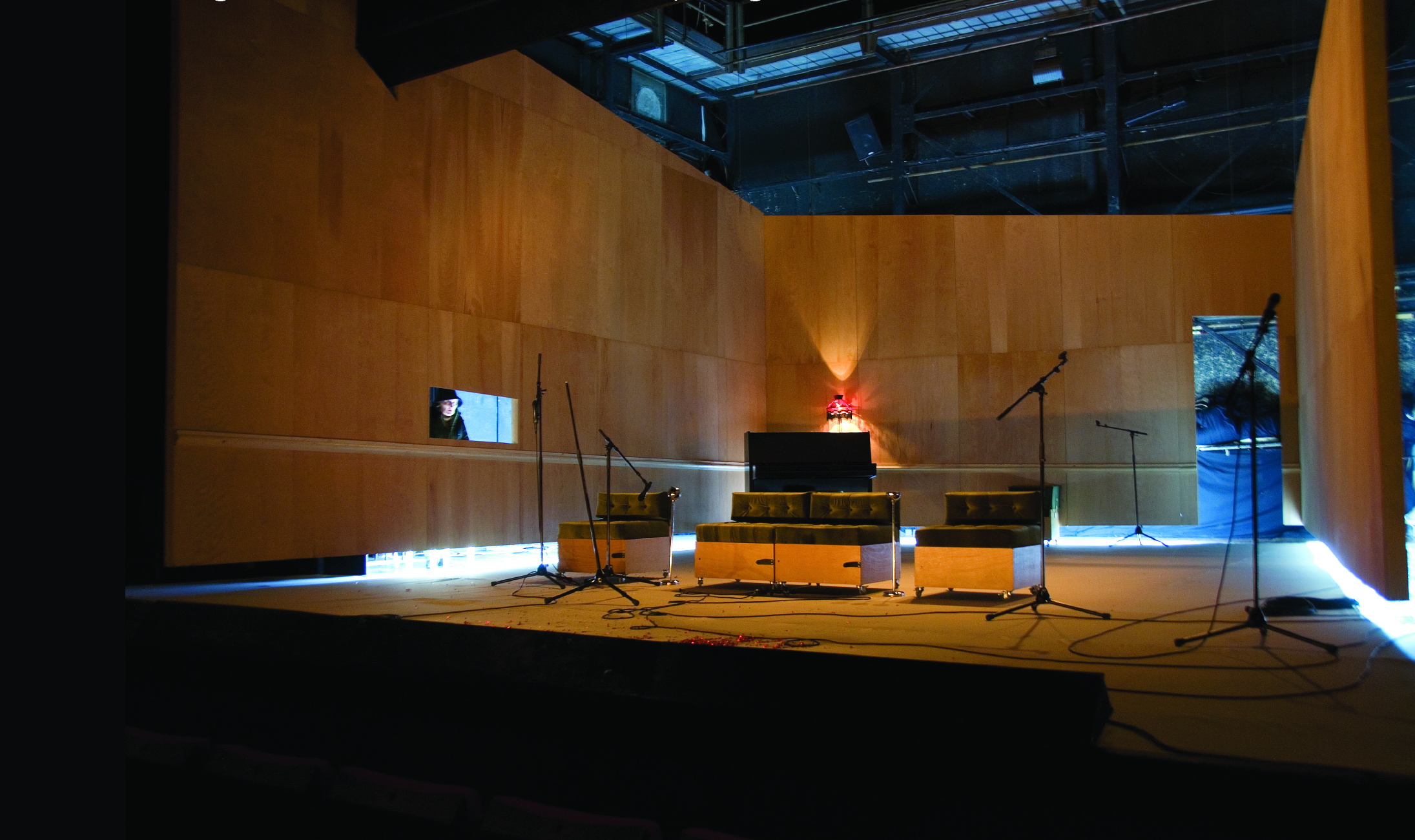 Snimak scenografije pozorišne predstave Sanjari-JDP, 2018. Autor:Jasmina Holbus